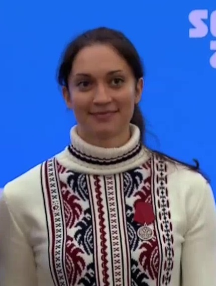 Екатерина Шихова